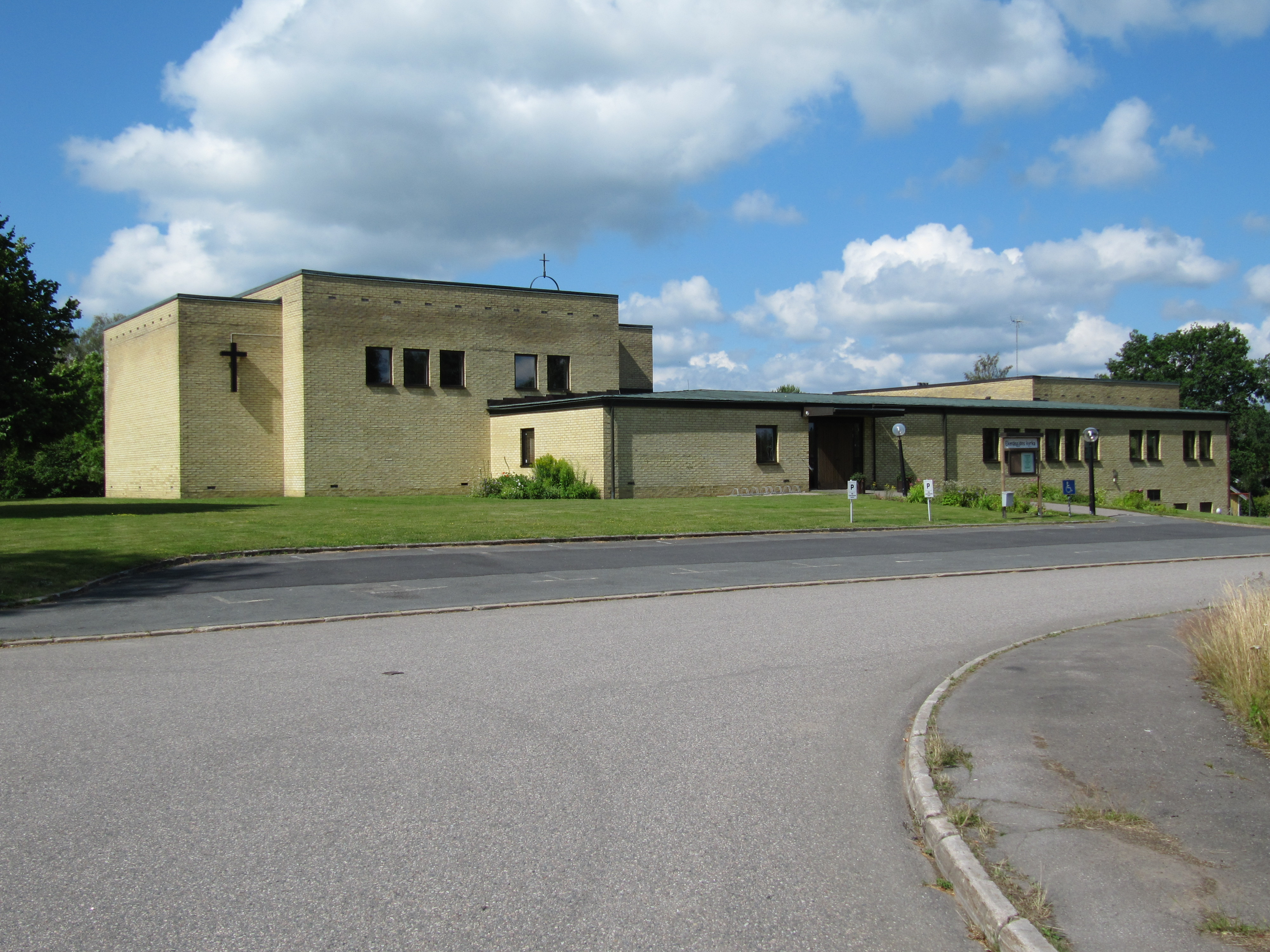 Ekenässjöns kyrka från öster